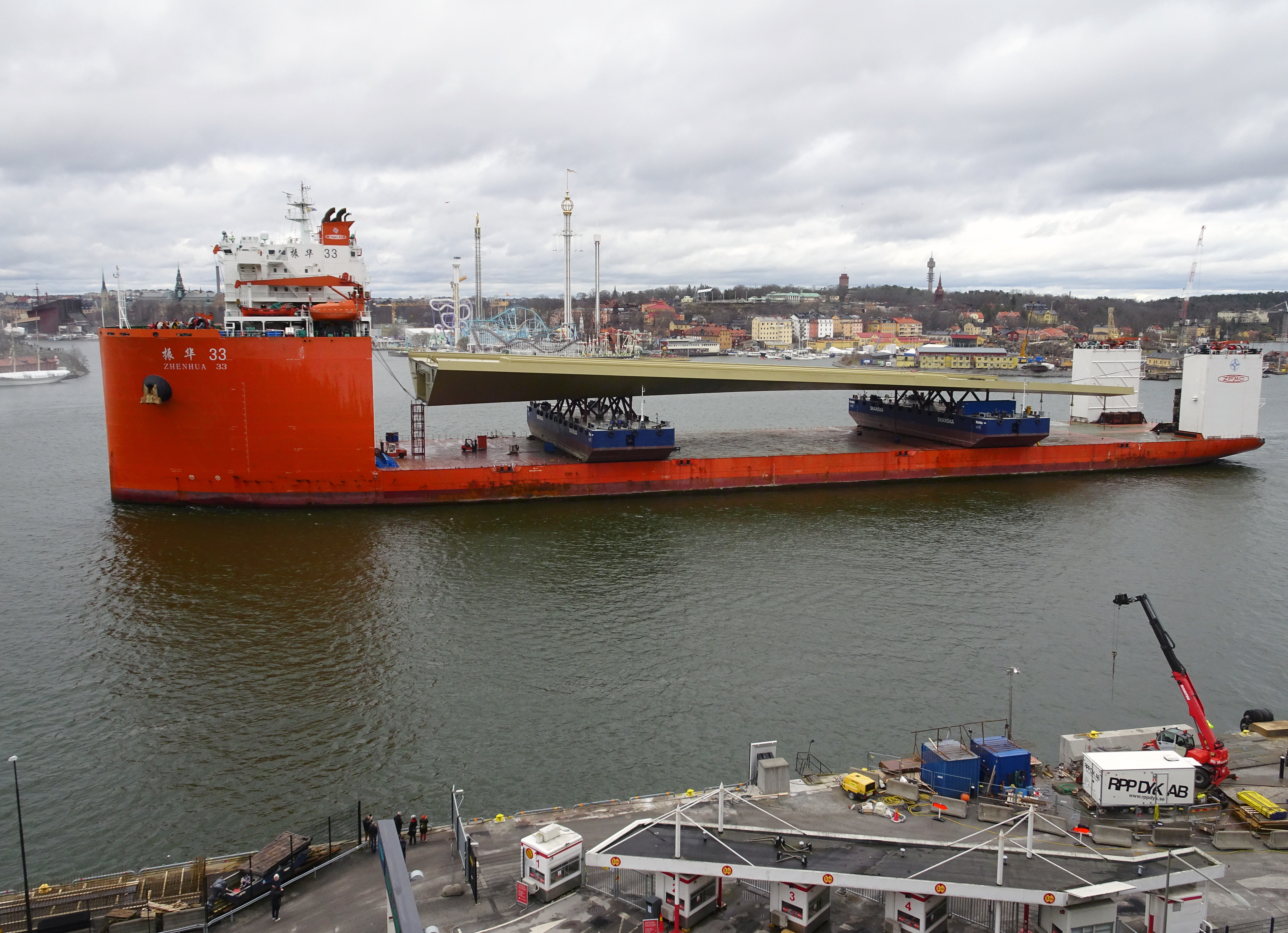 Guldbron på Stockholms inlopp, vy från Ersta